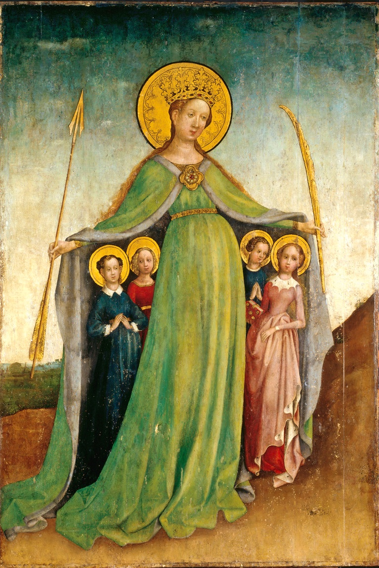 Ursule protectricelabel QS:Lfr,"Ursule protectrice"